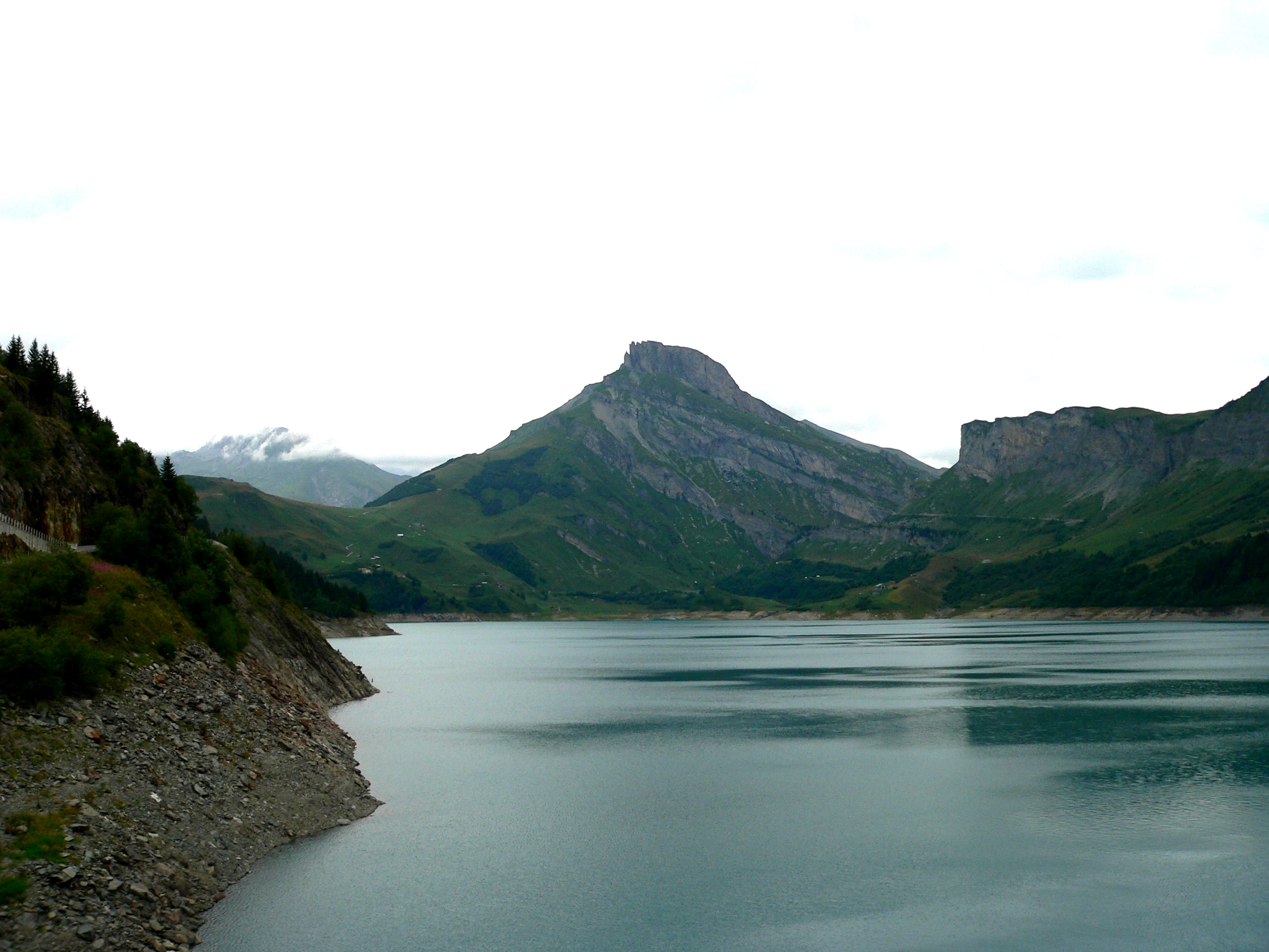 Lake Roselend, french Alpes